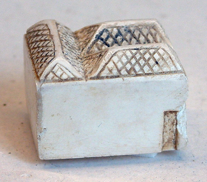 Maison miniature : Pièce de jeu (?) en ivoire provenant d'une tombe d'Abou Roach (près du Caire) contemporaine du roi Den (Période thinite)